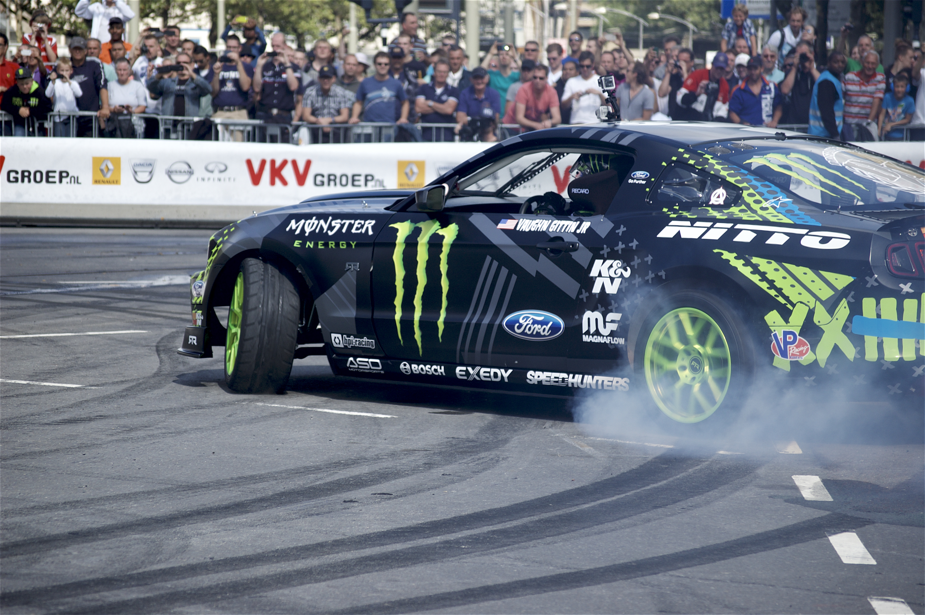 City Racing Rotterdam met Vaughn Gittin Jr (